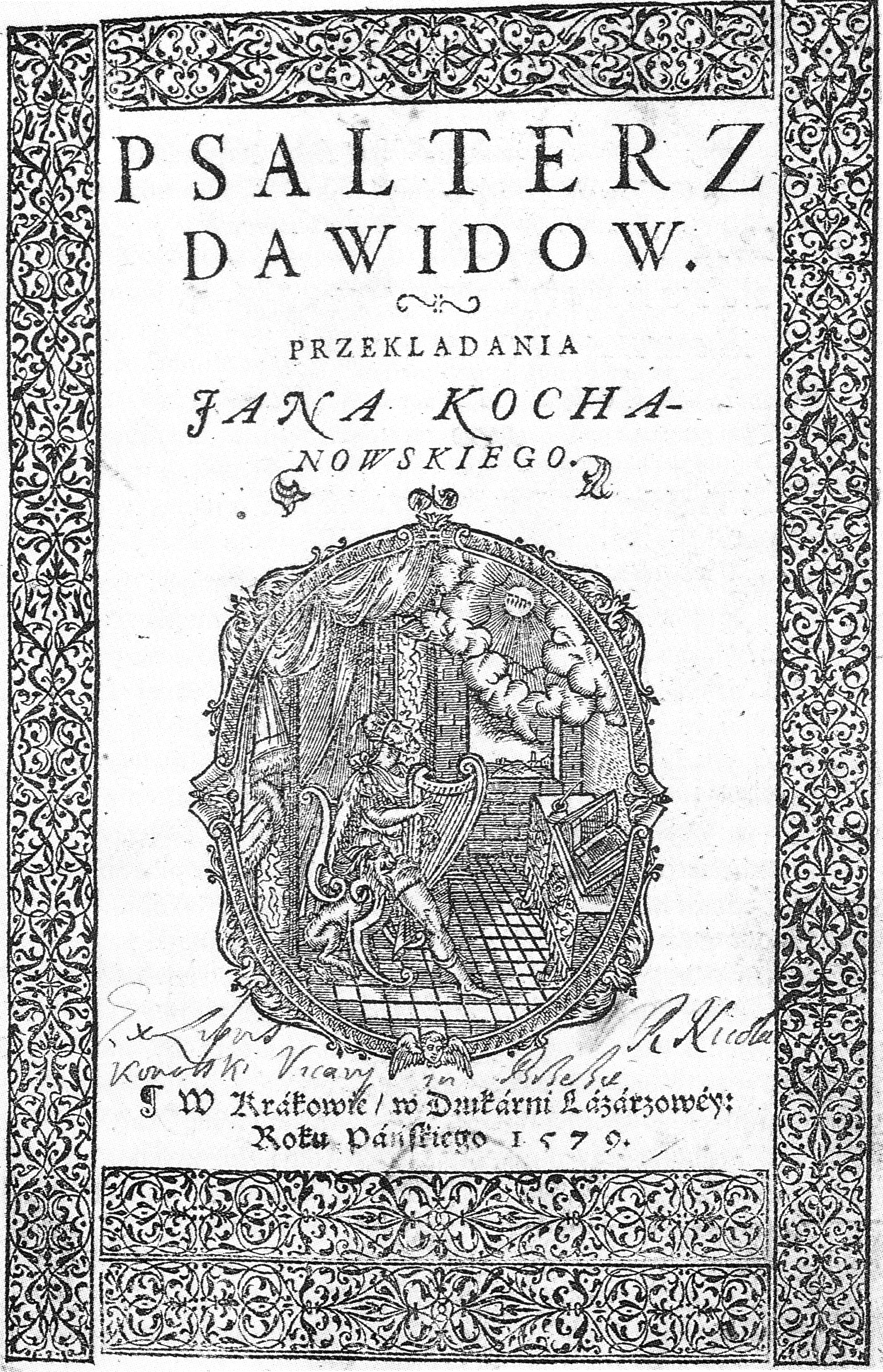 Strona tytułowa Psałterza Dawidów Jana Kochanowskiego z 1579 r.